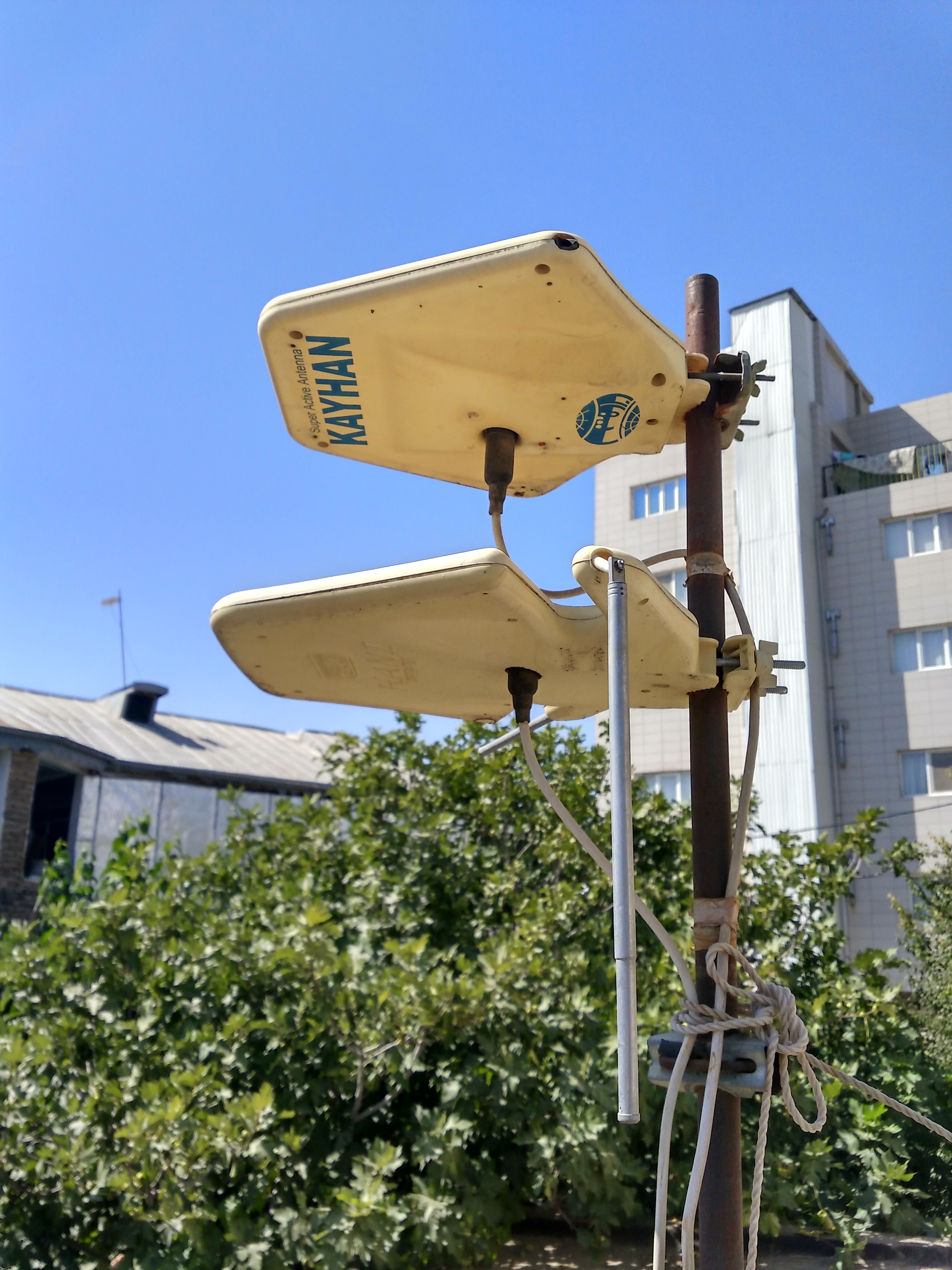 یک آنتن تلویزیون نسبتا قدیمی، نصب شده در پشت بام خانه‌ای در استان گلستان